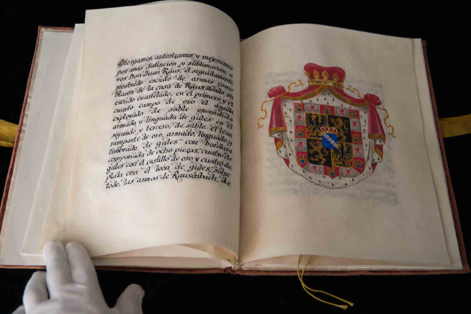 Kaiserlich Mexikanisches Diplom vom 21.07.1822 für Prinz Johann Raus, Herzog von Merida und von Rausenbach (Príncipe Juan Raus de Baviera, Duque de Mérida y de Rausenbach)